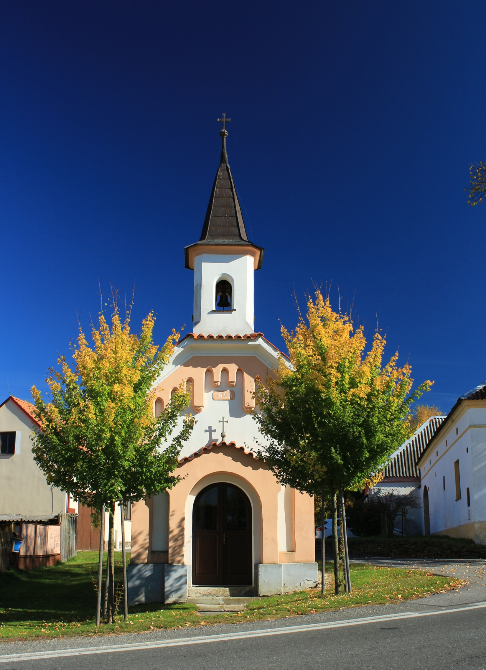 Bechyňská Smoleč, kaplička sv. Jana Nepomuckého